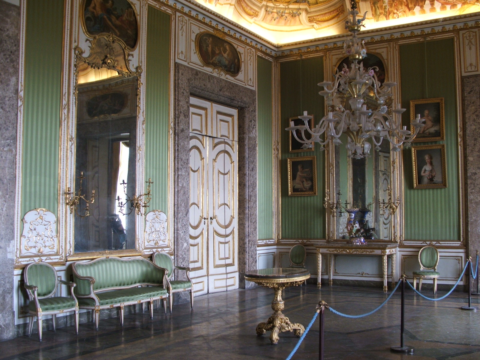 Caserta, immagini dalla Reggia di Caserta